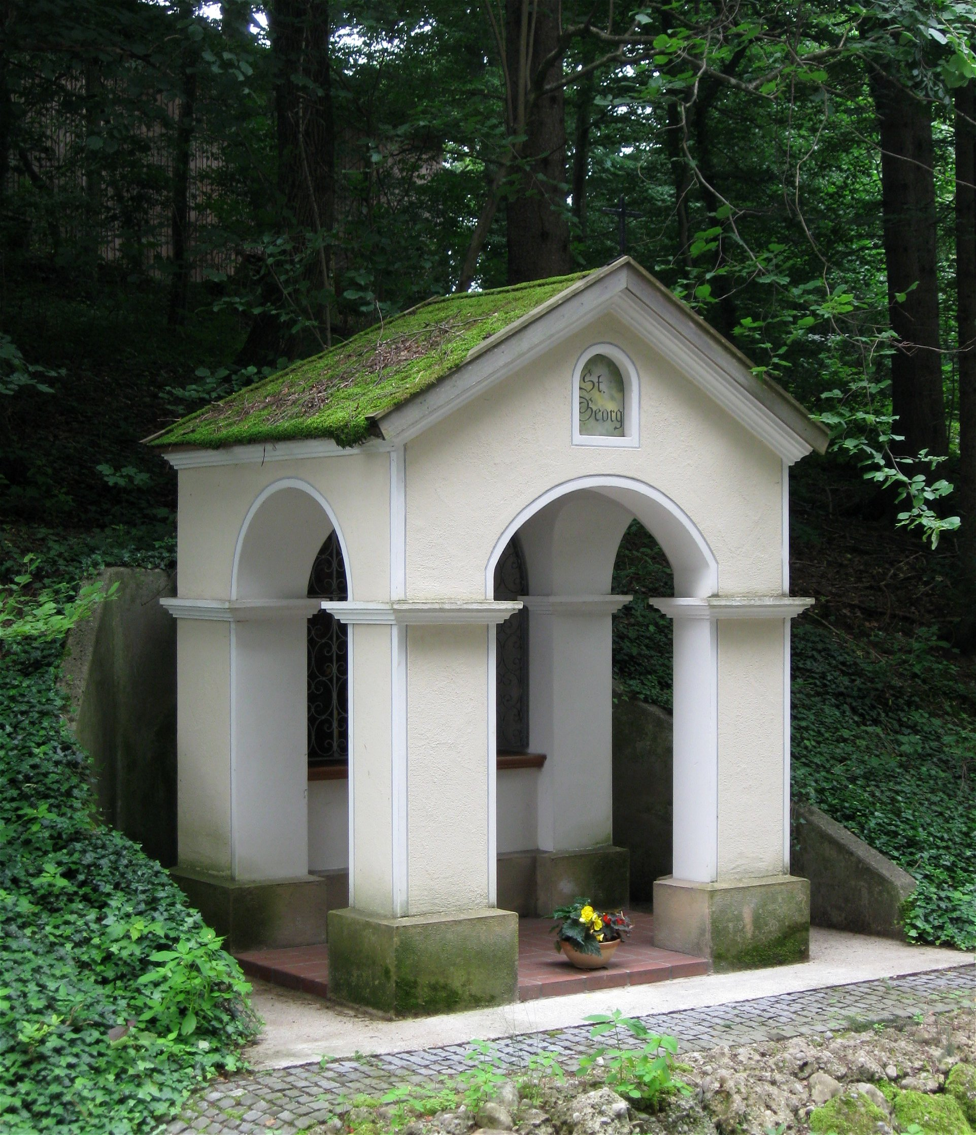 Kreuzpullach: Wegkapelle St. Georg westlich des Ortes, massive Nischenkapelle mit Portikus, 2. Viertel 19. Jh.